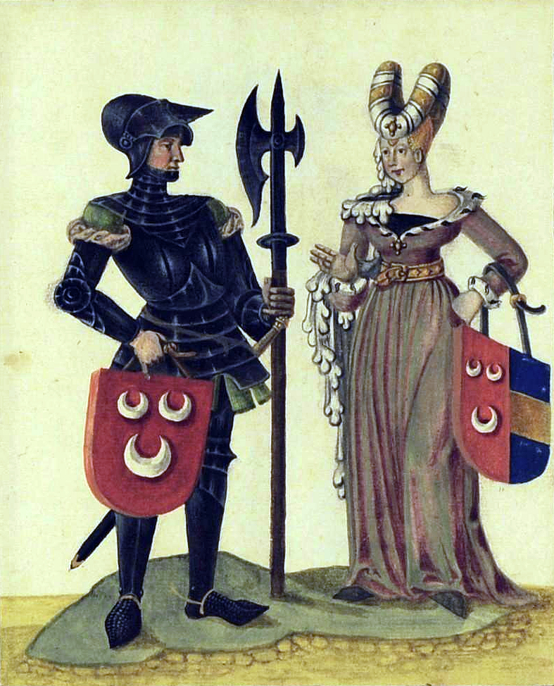 Filips III of Wassenaer (1307-1345), lord of Valckenburg and Catwijck, and his wife Alverardis Bertha van Cuijk, daughter of Hendrik van Cuijk, viscount of Leiden